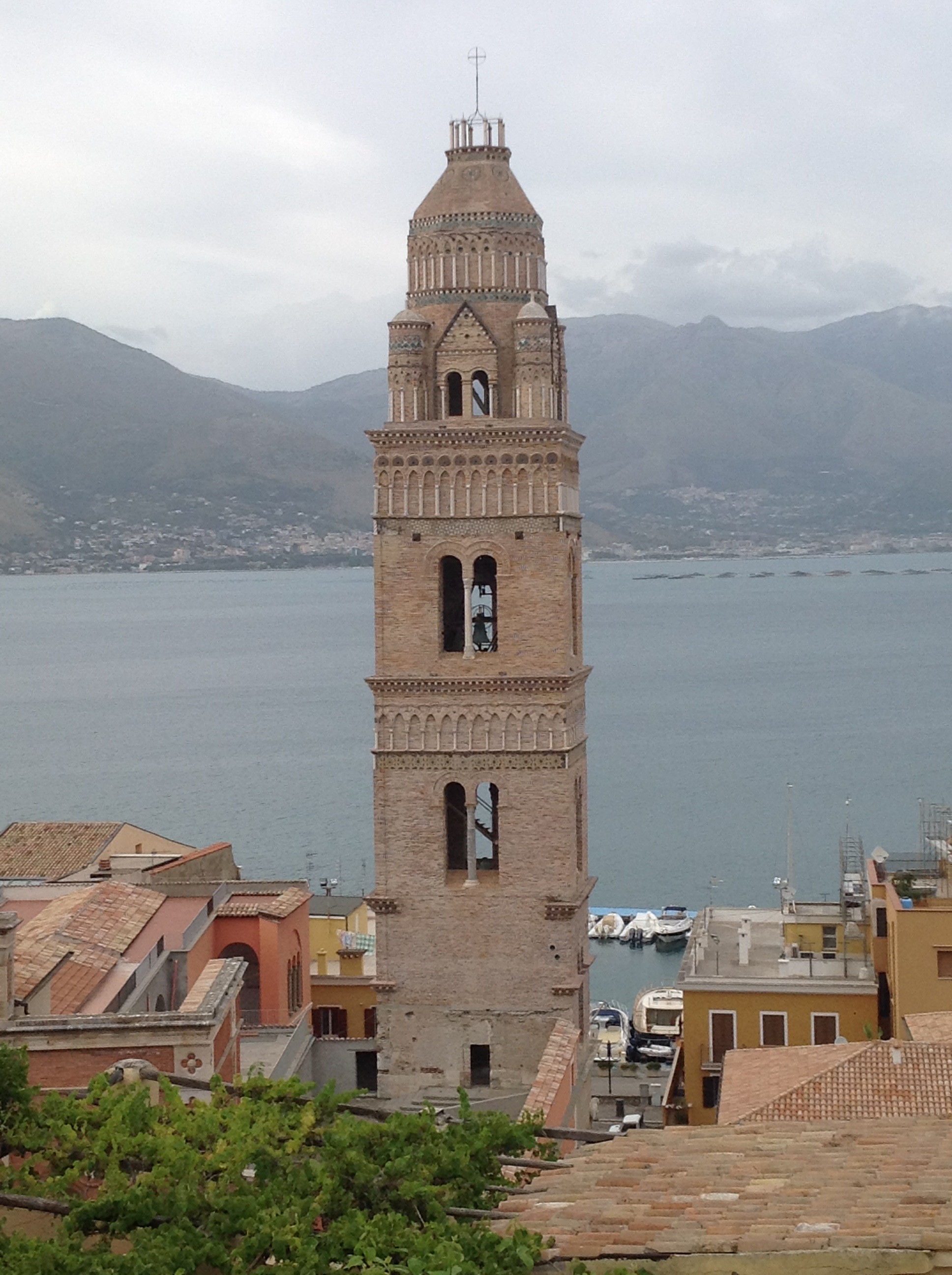 Il lato meridionale del campanile, visto da via Aragonese.